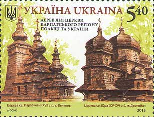 Марка України «Дерев'яні церкви Карпатського регіону Польщі та України. Церква св. Параскеви (XVІІ ст.), с. Квятонь. Церква св. Юра (XV-XVI ст.), м. Дрогобич» (Спільний випуск «Україна – Польща»)